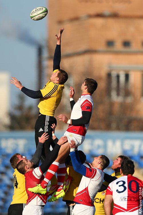 Олимп - Кредо. Ответный матч финальной серии 2014 года. Регби-15. "Олимп" - десятикратный чемпион Украины по регби-15!